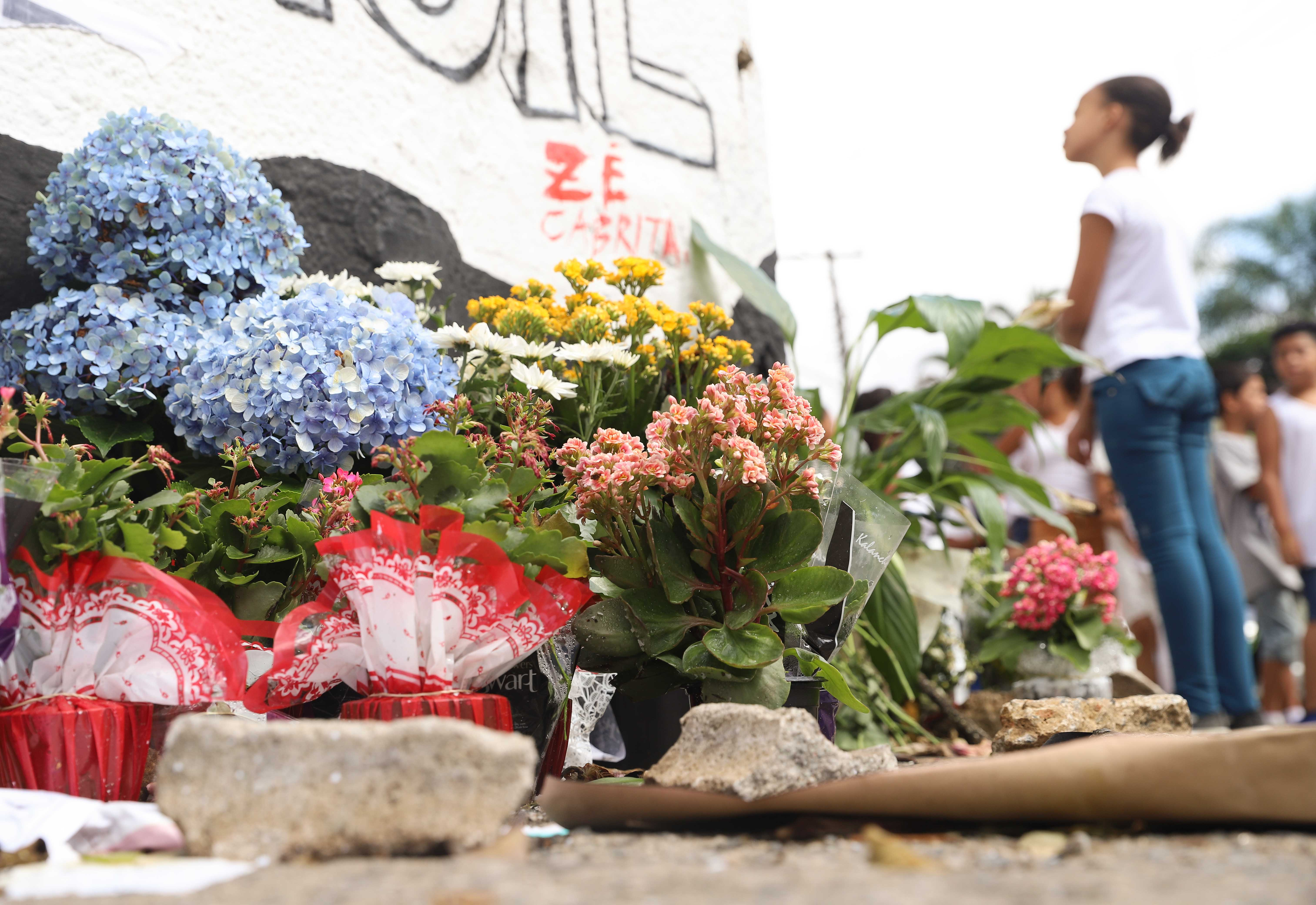 O secretário de Estado da Educação, Rossieli Soares, participa do culto ecumênico realizado na Escola Estadual Professor Raul Brasil, em Suzano. Local: Suzano/SP Data: 20/03/2019 Foto: Governo do Estado de São Paulo